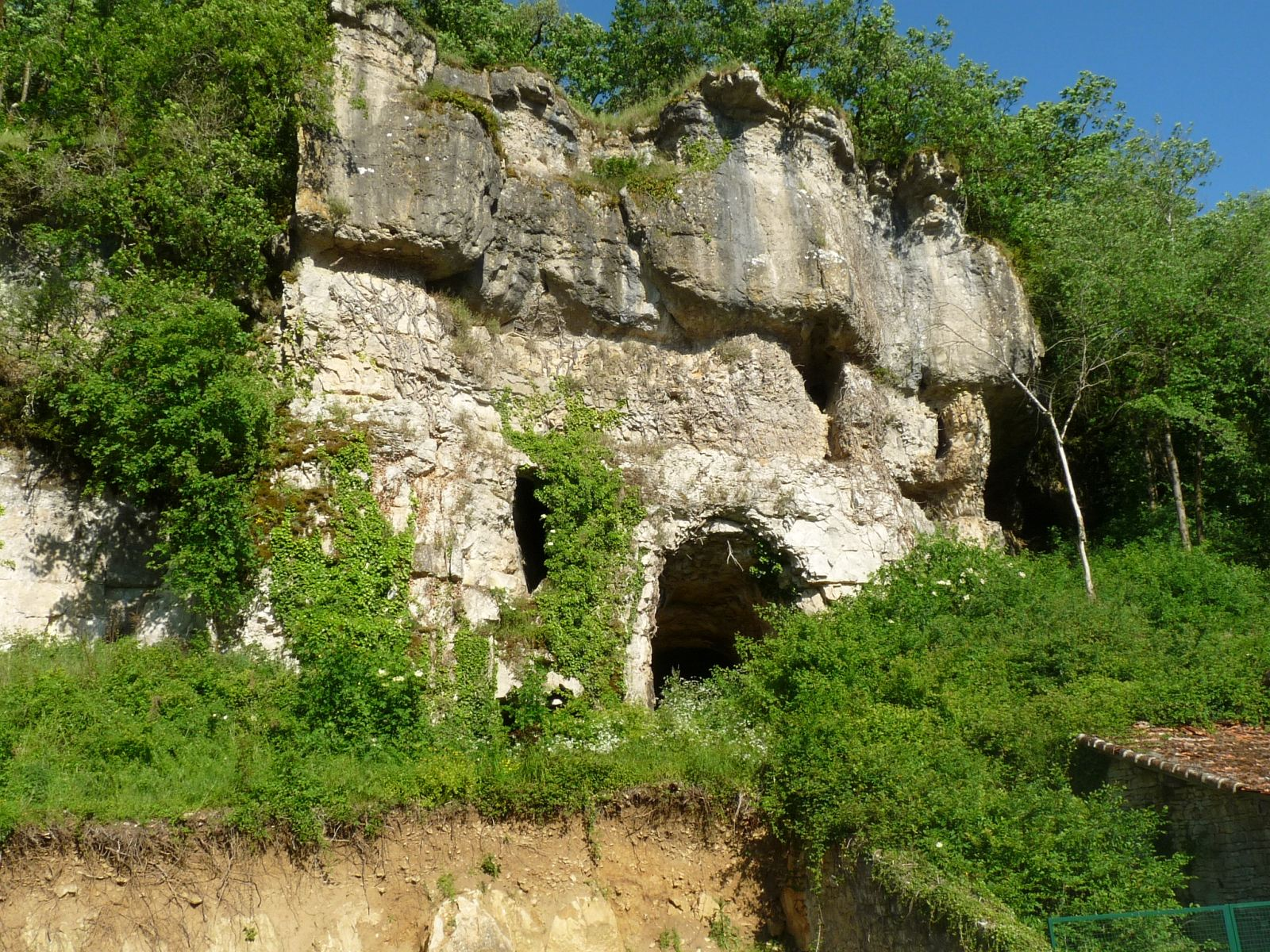 grotte de Rochebertier, Vilhonneur (Charente, France)